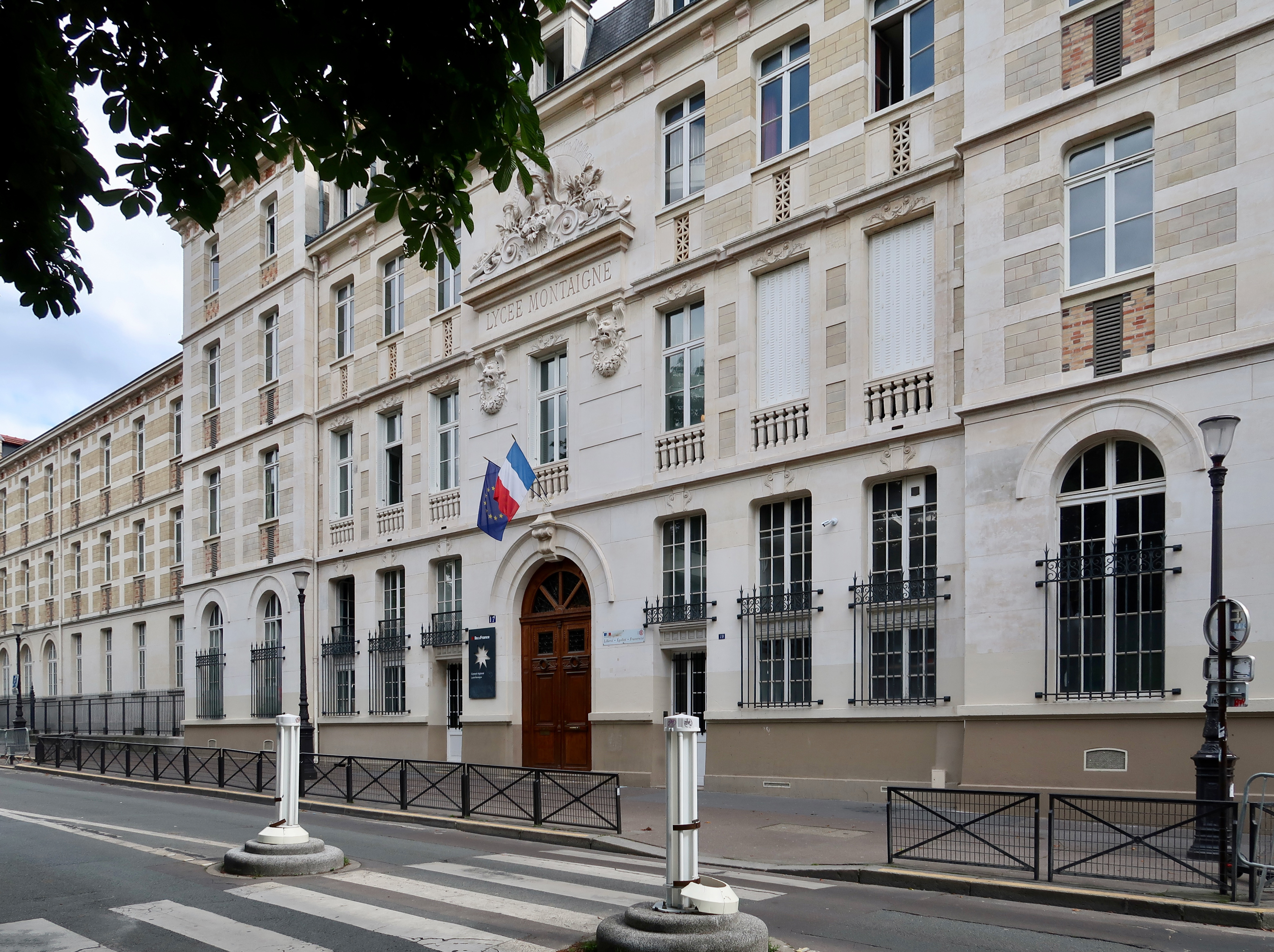 Lycée Montaigne, 17 rue Auguste-Comte (Paris, 6e).